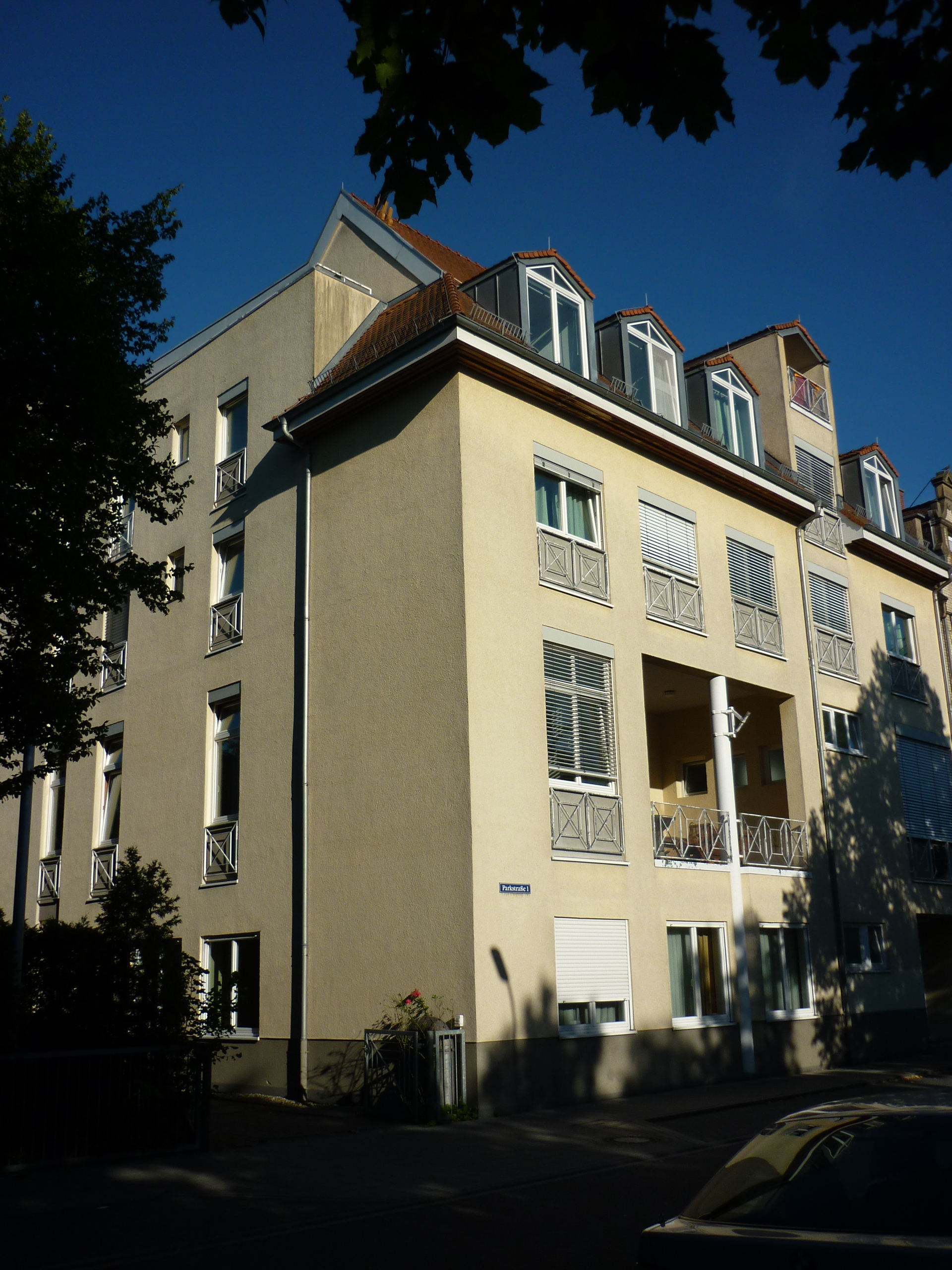 Burschenschaft Teutonia, Karlsruhe, 07.2012